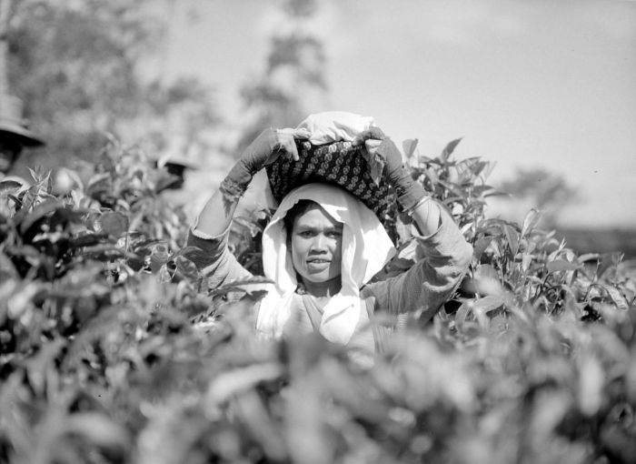 Negatief. Hoewel de export van thee nooit dezelfde omvang als die van koffie of suiker zou bereiken, werd de Java-thee een groot succes. Net als koffie werd het vooral geplant op in erfpacht uitgegeven 'woeste' gronden, die bijna per definitie vaak ver van de dorpen lagen. Daardoor was het aantrekken van arbeidskrachten een probleem. Een goed beeld van deze samenleving geeft de roman van Hella Haasse Heren van de thee. Theeplukken werd (en wordt) beschouwd als een vrouwelijke bezigheid. (P. Boomgaard, 2001). Theeplukster, Preanger